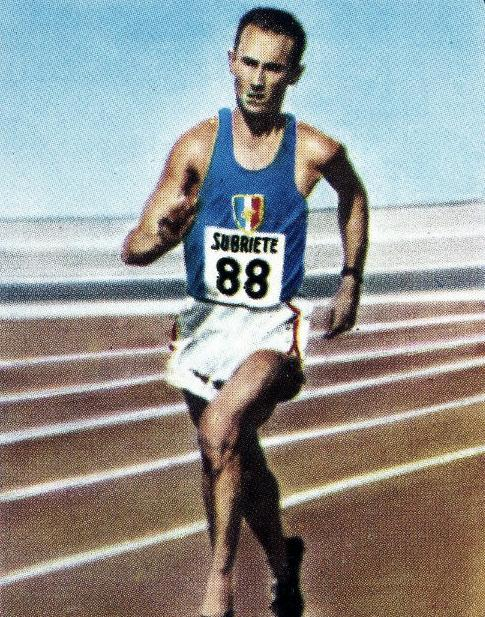 Jean Wadoux en 1968 -PANINI 1968/1979, n°32